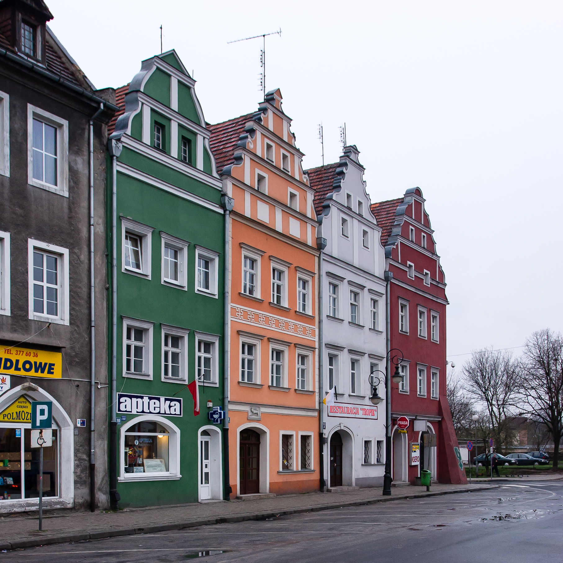 Kamienice